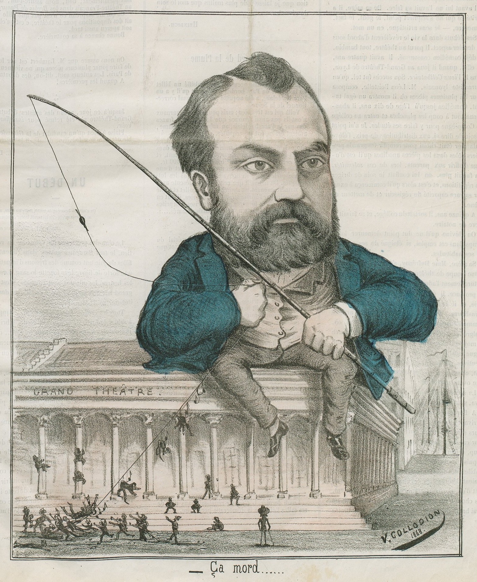 "M. Halanzier-Dufrénoy, directeur du Grand-Théâtre".